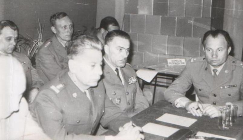 Przasnysz, dowódca Szkoły Podoficerów i Młodszych Specjalistów Rozpoznania Radioelektronicznego mjr Marian Matusiak